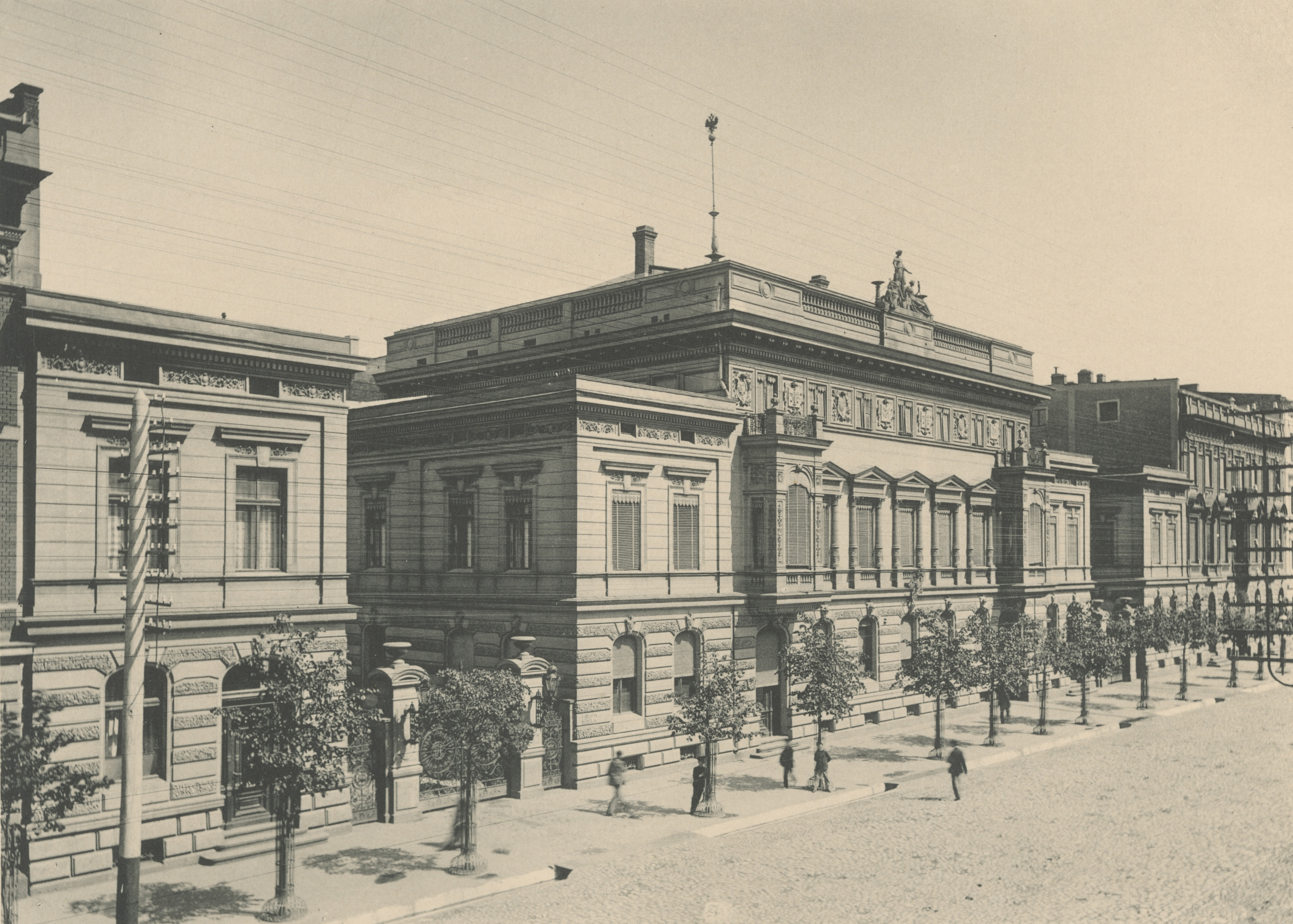 Fotografia przedstawia pałac Juliusza Heinzla znajdujący się przy ulicy Piotrkowskiej 104. Projektu pałacu wykonał Hilary Majewski, a jego budowy podjęła się firma projektowo-budowlana Otto Gehliga, absolwenta berlińskiej Akademii Technicznej i przyszłego zięć. J. Hainzla. Budowa została ukończona w 1882 roku. Na parterze mieściły się biura firmy Heinzla, na piętrze salony reprezentacyjne, a w oficynie i na poddaszu pokoje mieszkalne. W głębi działki znajdowały się budynki fabryczne (zakłady wełniane) Heinzla. Pałac powstał stylu eklektycznym, nawiązującym do renesansu. W skład budynku wchodzą: trójkondygnacyjny korpus główny, niższe skrzydła boczne oraz dwa pawilony zakończone wieżami. Fasadę frontową na pierwszym piętrze zdobią umieszczone bo bokach wykusze. Poniżej gzymsu biegnie fryz z płyciznami w formie kartuszy, z emblematami handlu i przemysłu zamiast rodowego herbu. Fasadę wieńczy rzeźbiarska kompozycja figuralna sygnowana literami EMS z roku 1880, a przedstawiająca alegorię Wolności, Przemysłu i Handlu. Po 1945 roku budynki zajął Urząd Miasta Łodzi. Fotografia pochodzi z wydanego w 1896 roku albumu Bronisława „Widoki m. Łodzi”. Saryusz Bronisław Paweł Wilkoszewski (1847-1901), zwany "łódzkim Canaletto" był mistrzem fotografii ilustracyjnej. Udokumentował zabudowę Łodzi z końca XIX wieku przede wszystkim wille, fabryki, budynki użyteczności publicznej, obiekty sakralne, ulicę Piotrkowską. Jego zakład fotograficzny znajdował się w willi "Trianon" w Pasażu Meyera 5 (obecnie ulica Moniuszki).